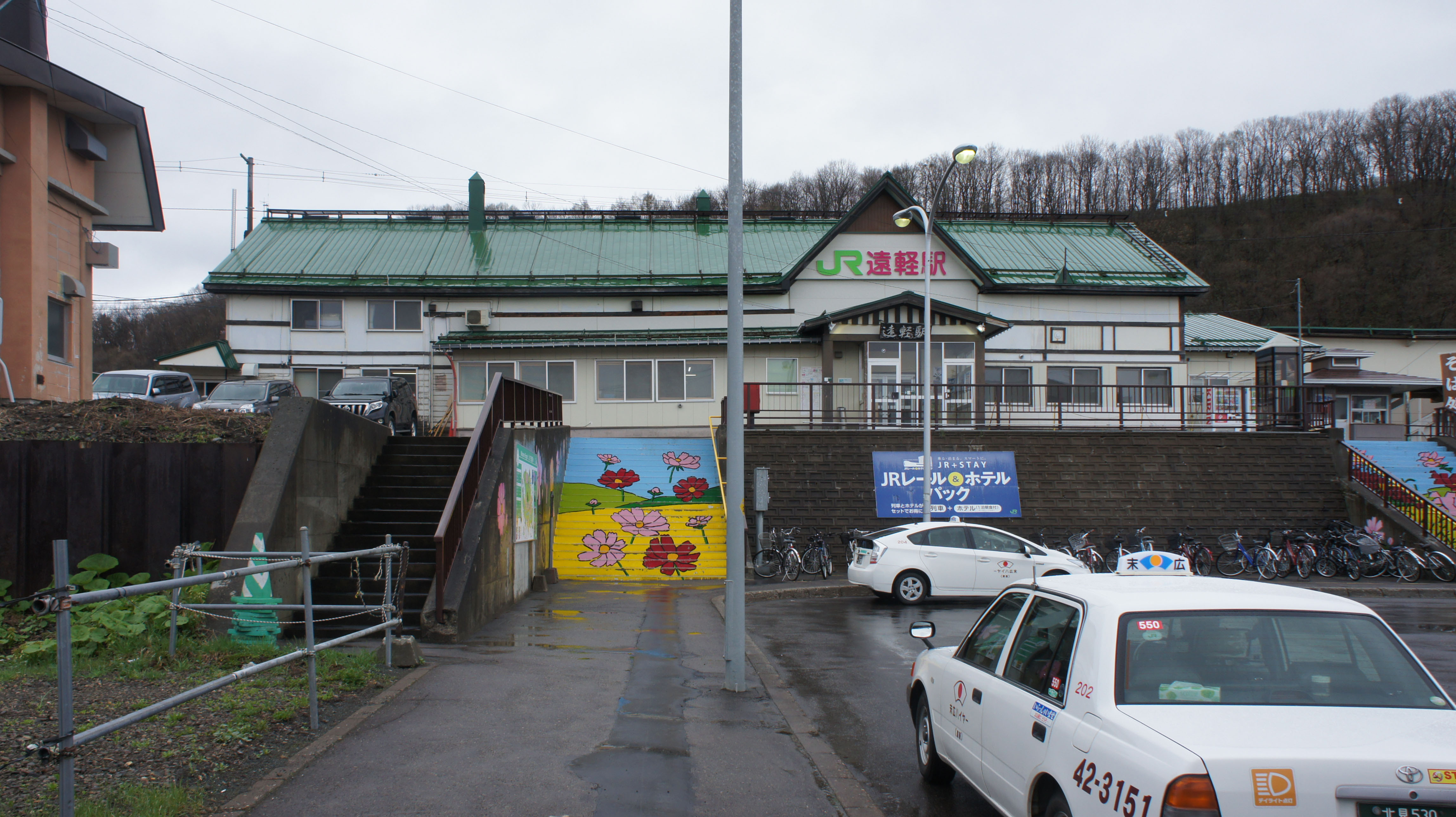 JR石北本線・遠軽駅の駅舎